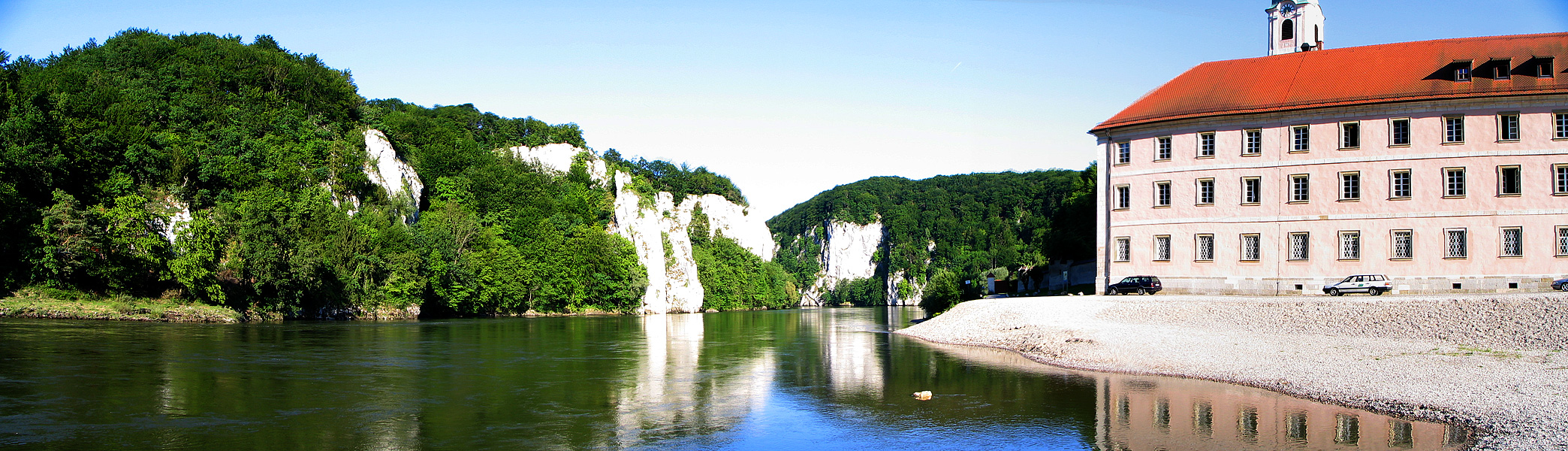 Kloster Weltenburg/ Monastery Weltenburg Bayern, Deutschland / Bavaria, Germany